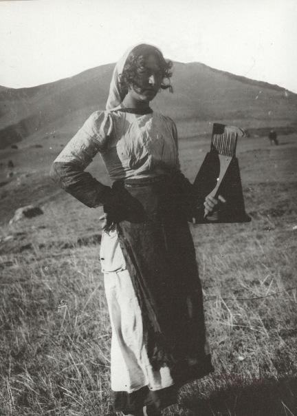 Портрет девушки из селения Таргим (селение Таргим, Галгаевский шахар, Ингушетия, 1921)